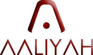 Logotyp för den amerikanska artisten Aaliyah.